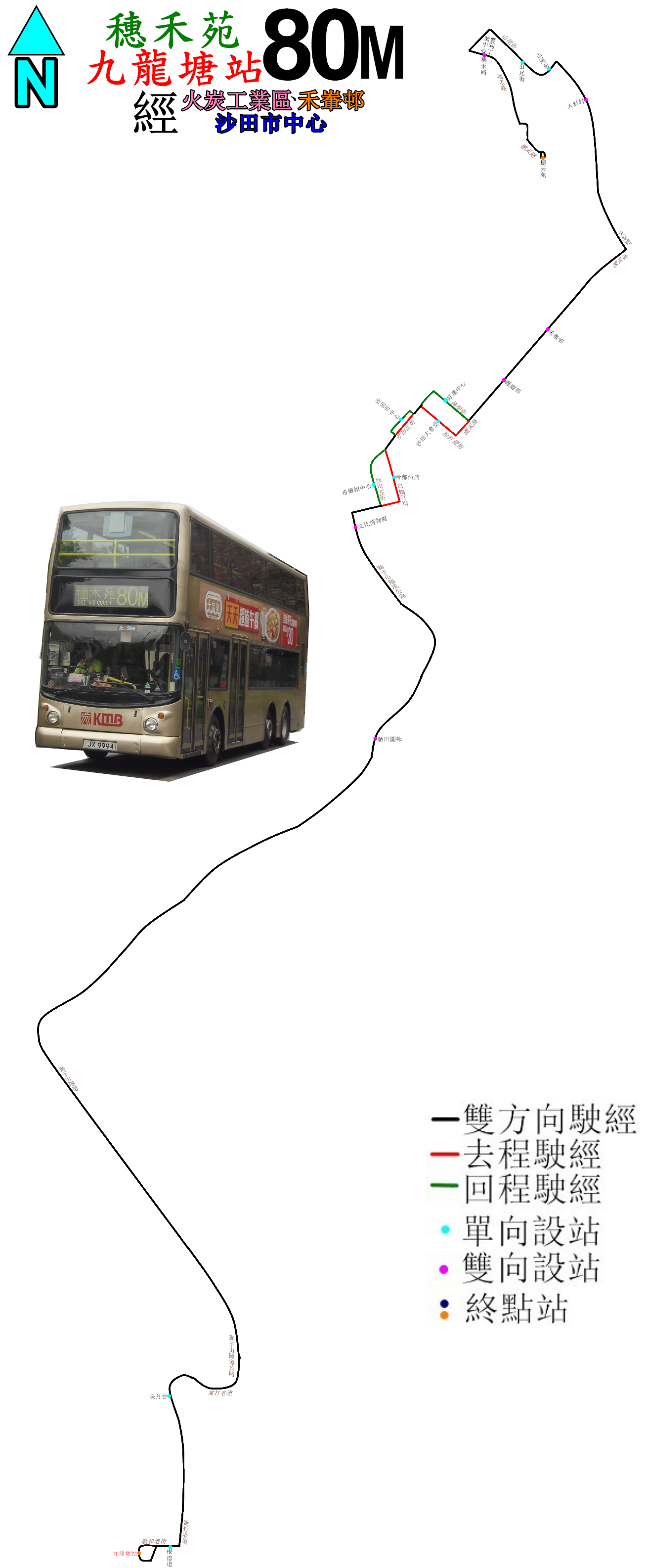 中文（香港）: 九巴80M線的走線圖，惟暫時沒有巴士相